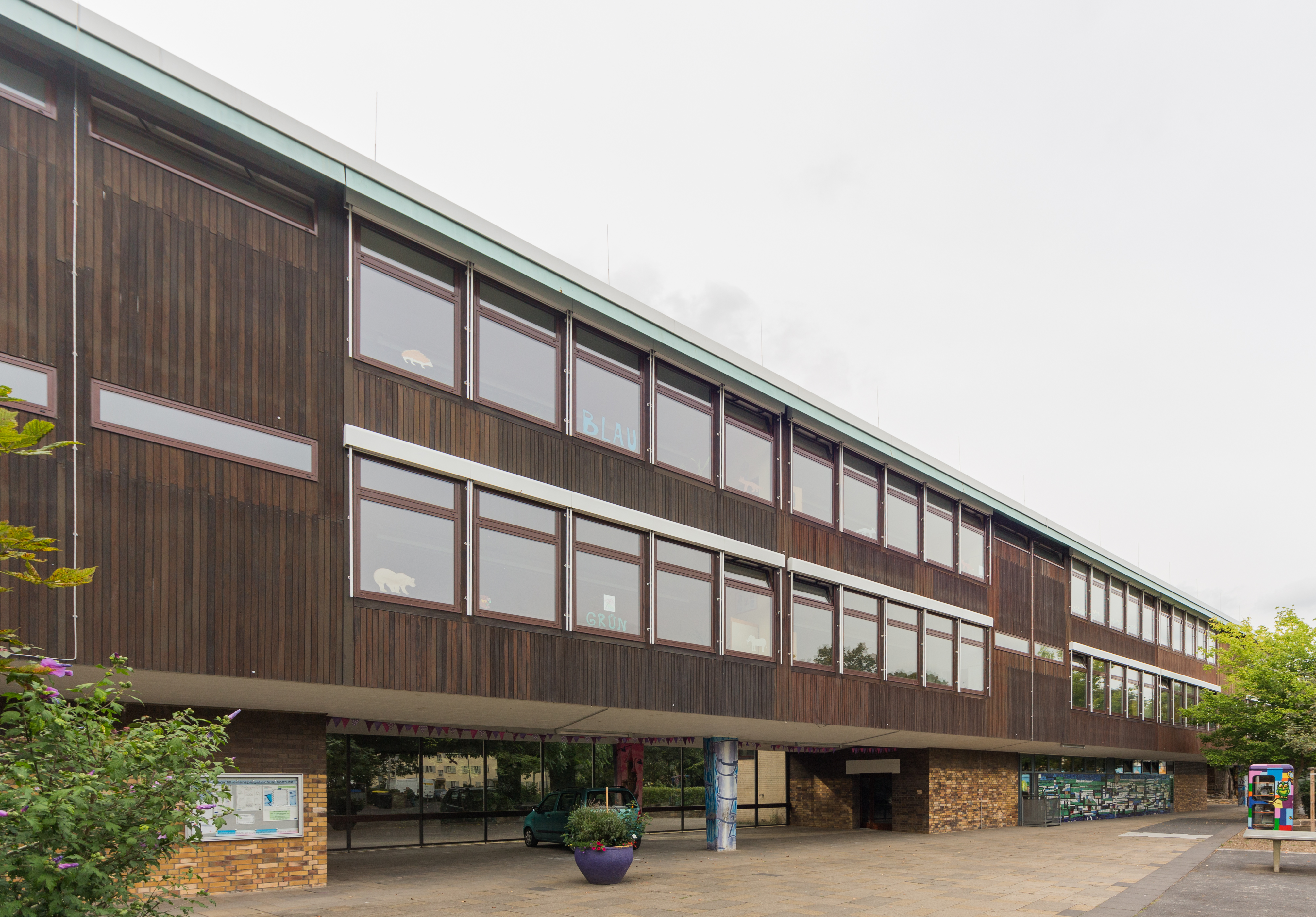 Till-Eulenspiegel-Schule, Renoisstraße 1a, Bonn-Kessenich